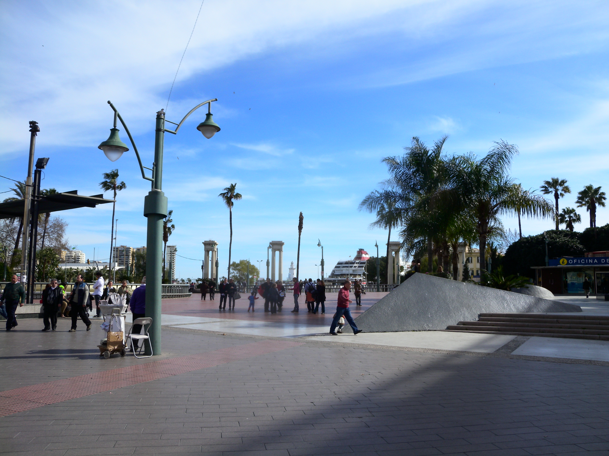 Ensanche Centro, Málaga, Spain